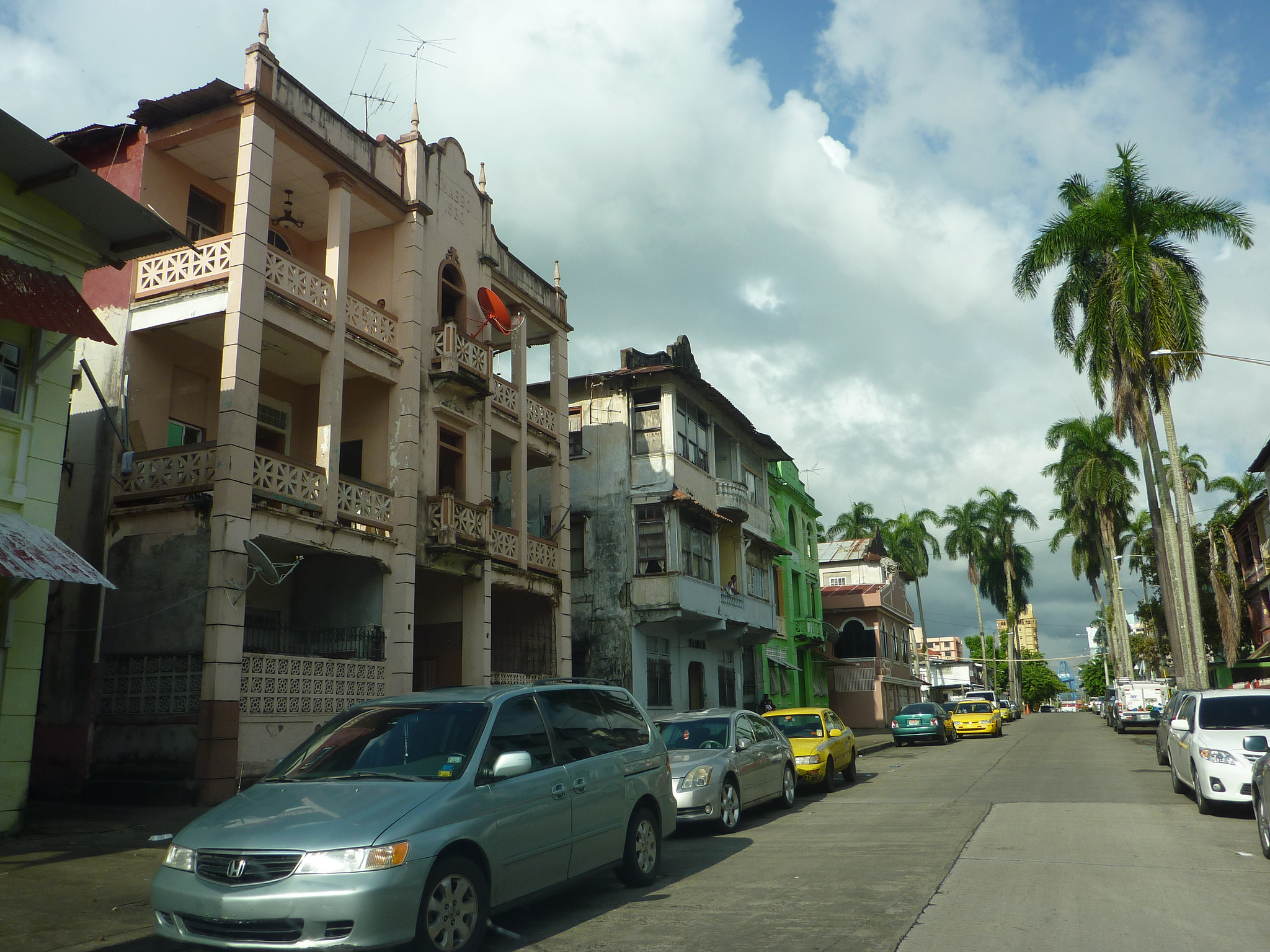 Isabel y Meléndez